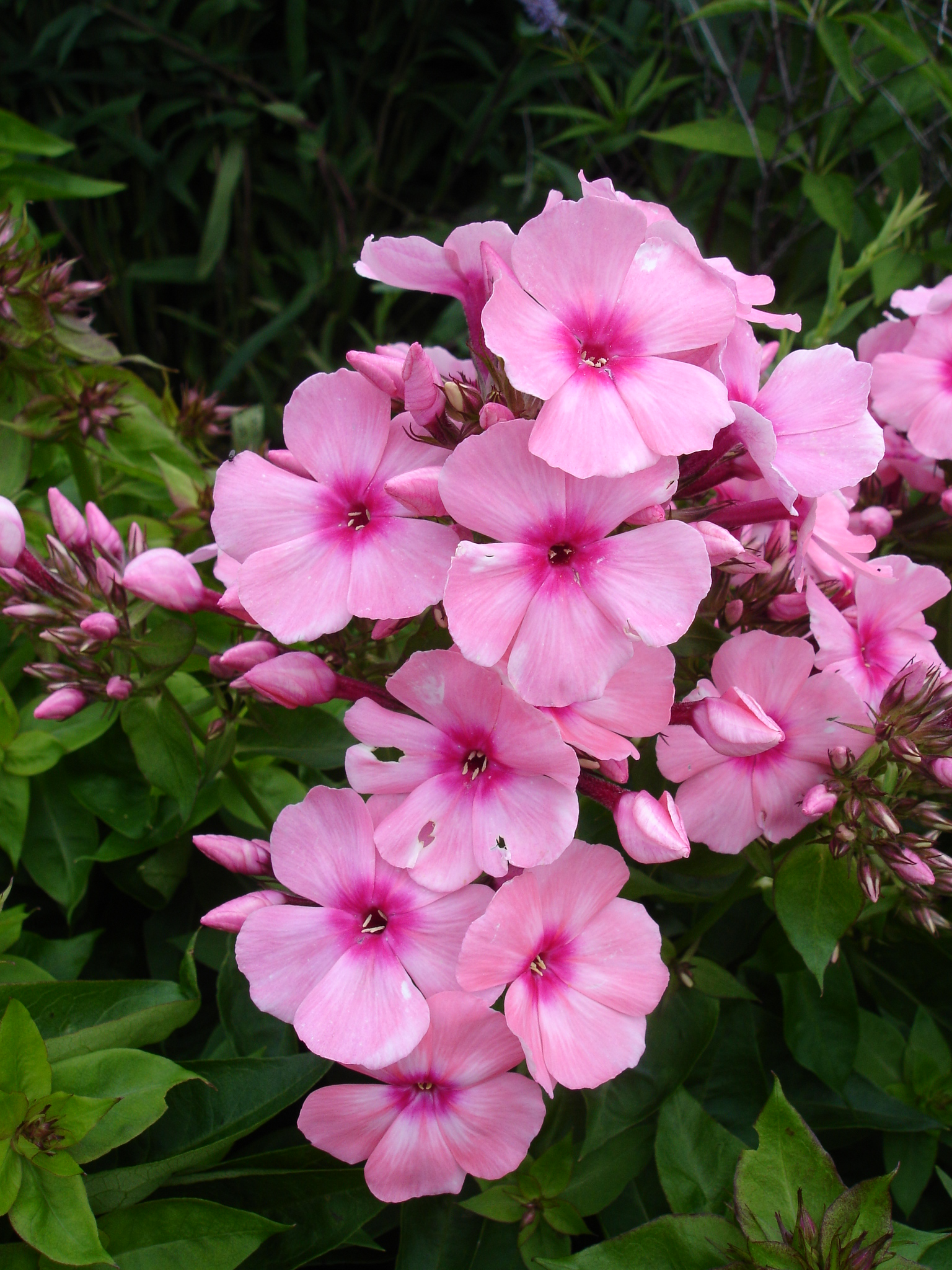 Phlox paniculata 'Bareleven'